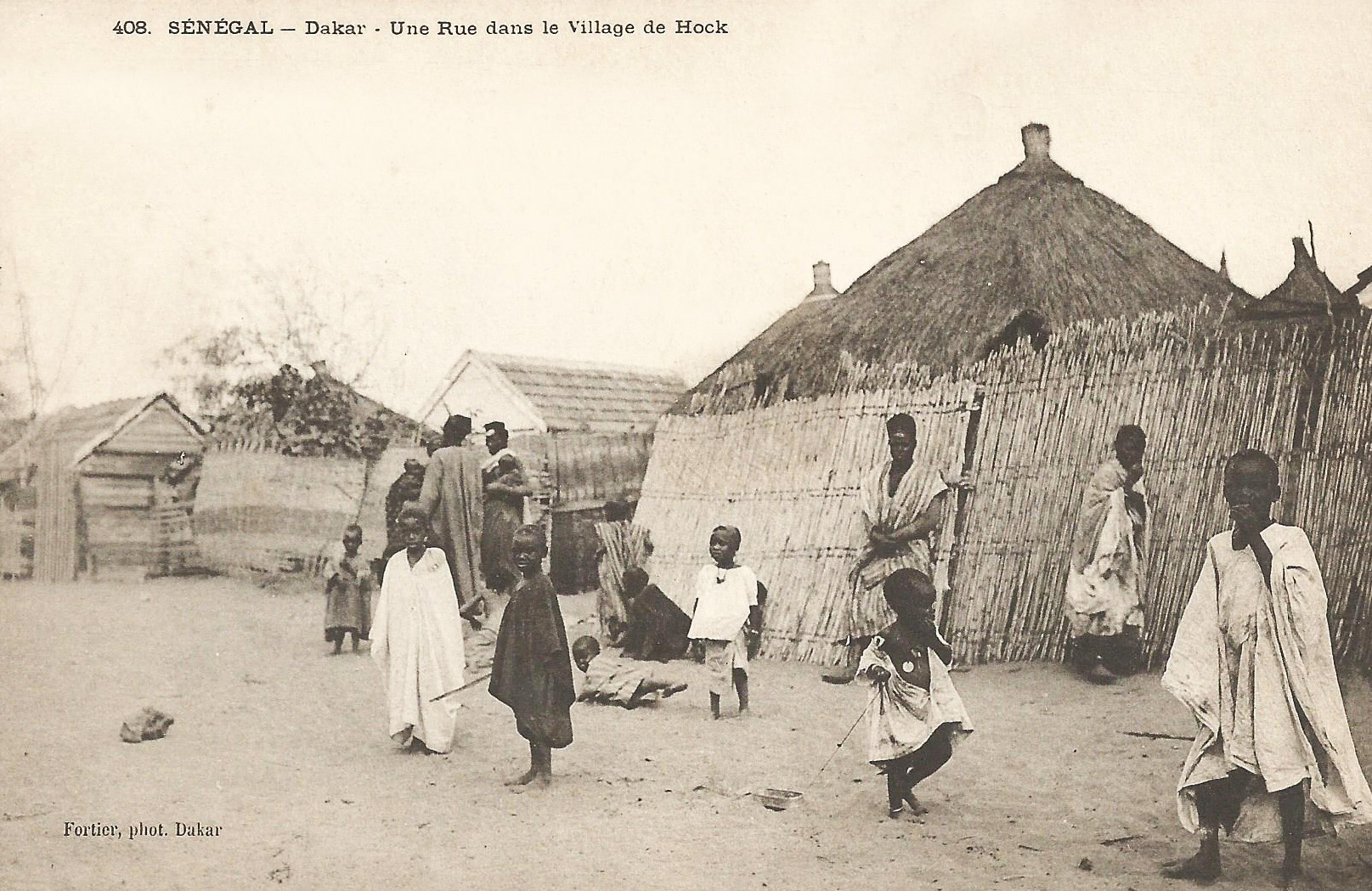 François-Edmond Fortier, Dakar. Une rue dans le village de Hock. Afrique Occidentale - Sénégal.